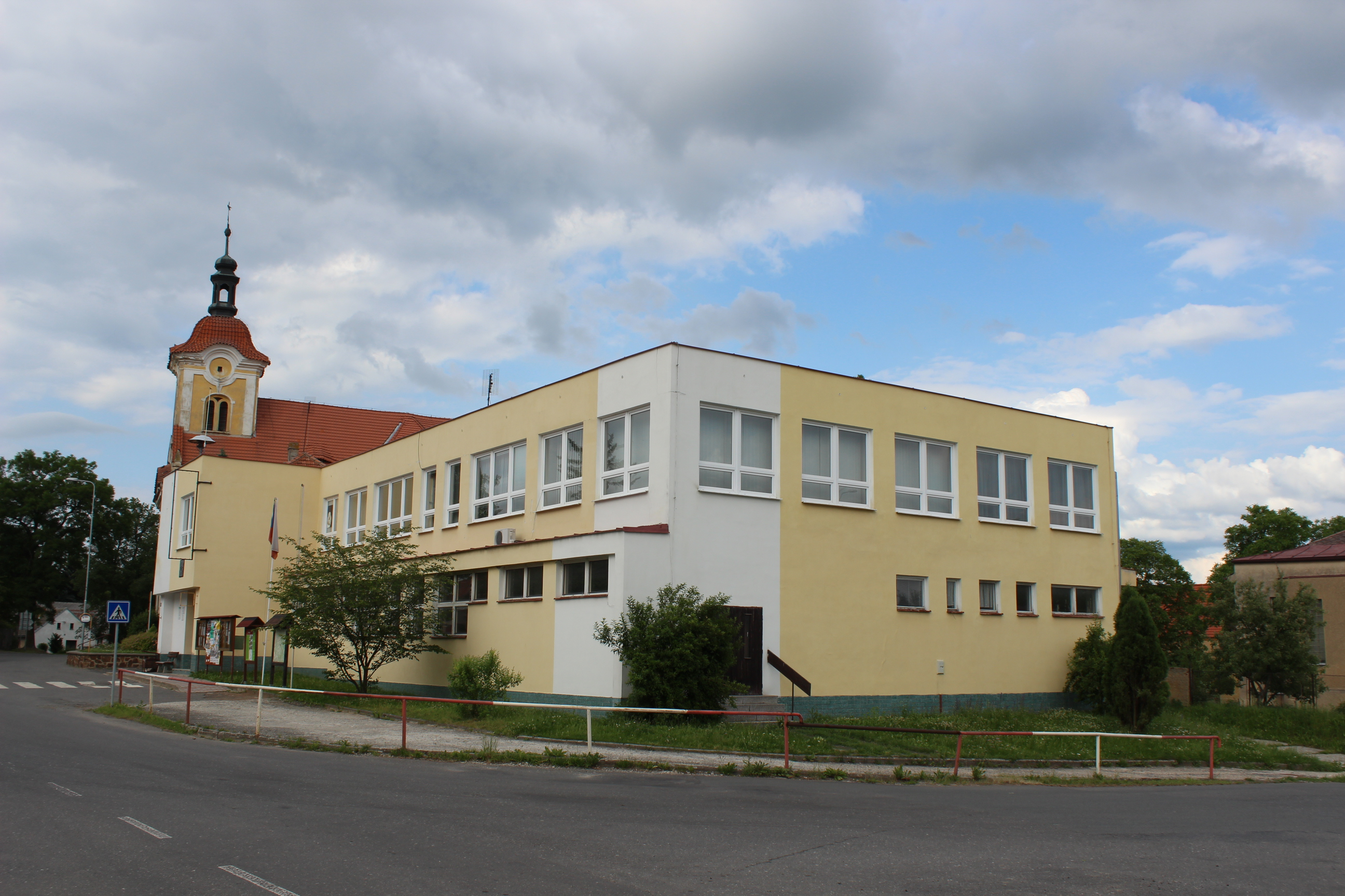 Úřad městyse v Pavlíkově (dům číslo popisné 185).